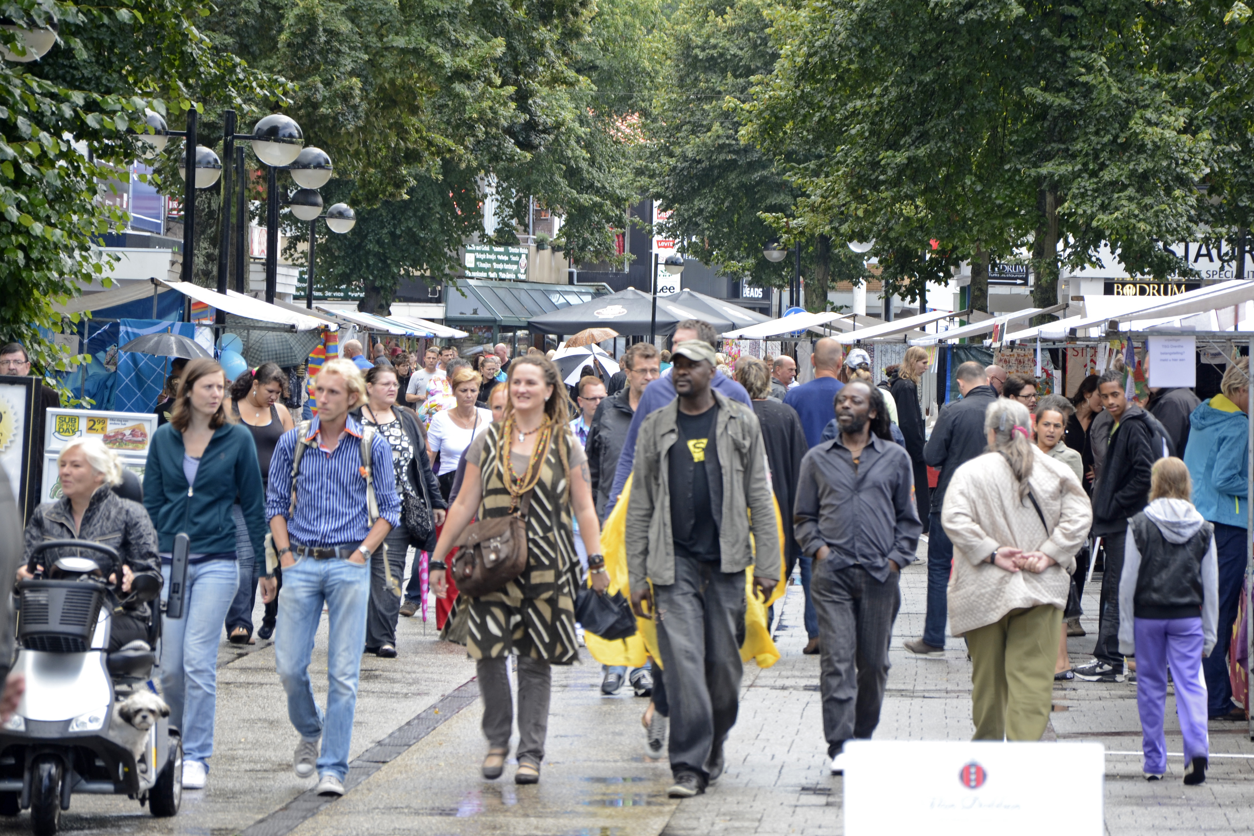 Het centrum van Emmen stond zondag 26 augustus 2012 bol van de actviteiten. Die dag werdt van 13 tot 19 uur het zinderende Full Colour Festival gehouden, met als thema: Kleur je wereld. Dit grootste eendaagse multiculturele evenement in Noord-Nederland, trekt jaarlijks meer dan 40.000 bezoekers